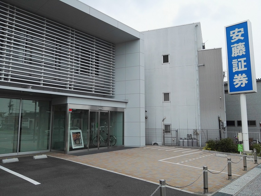 Ando Securities Nishio branch, Aichi